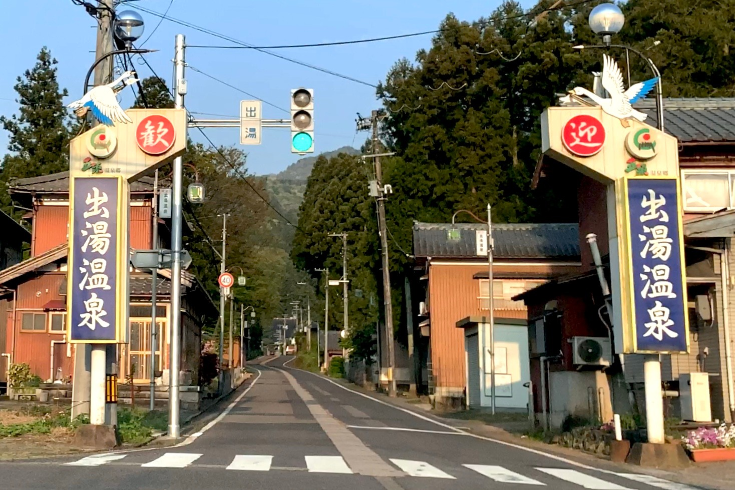 五頭温泉郷 出湯温泉の入口（2020年5月） 新潟県道329号五頭連峰公園線終点